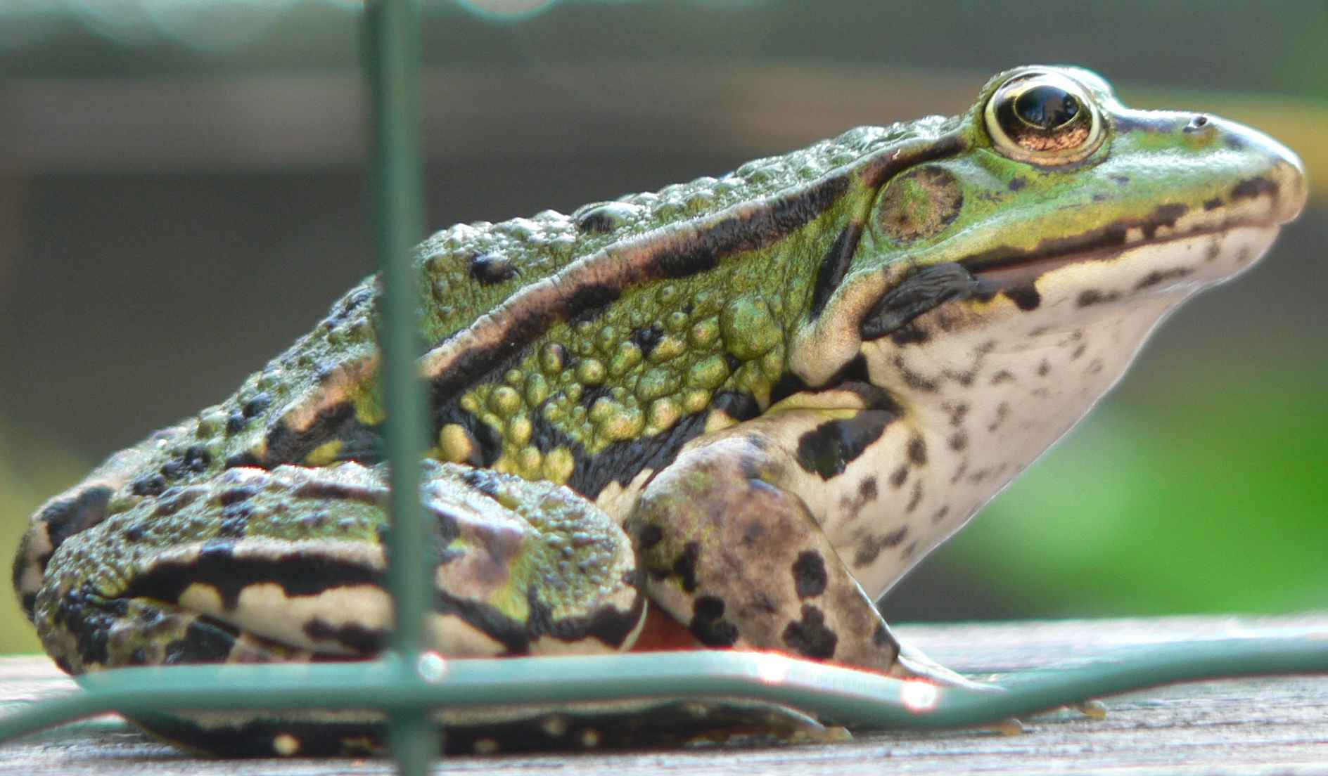 Green frog, Belgium